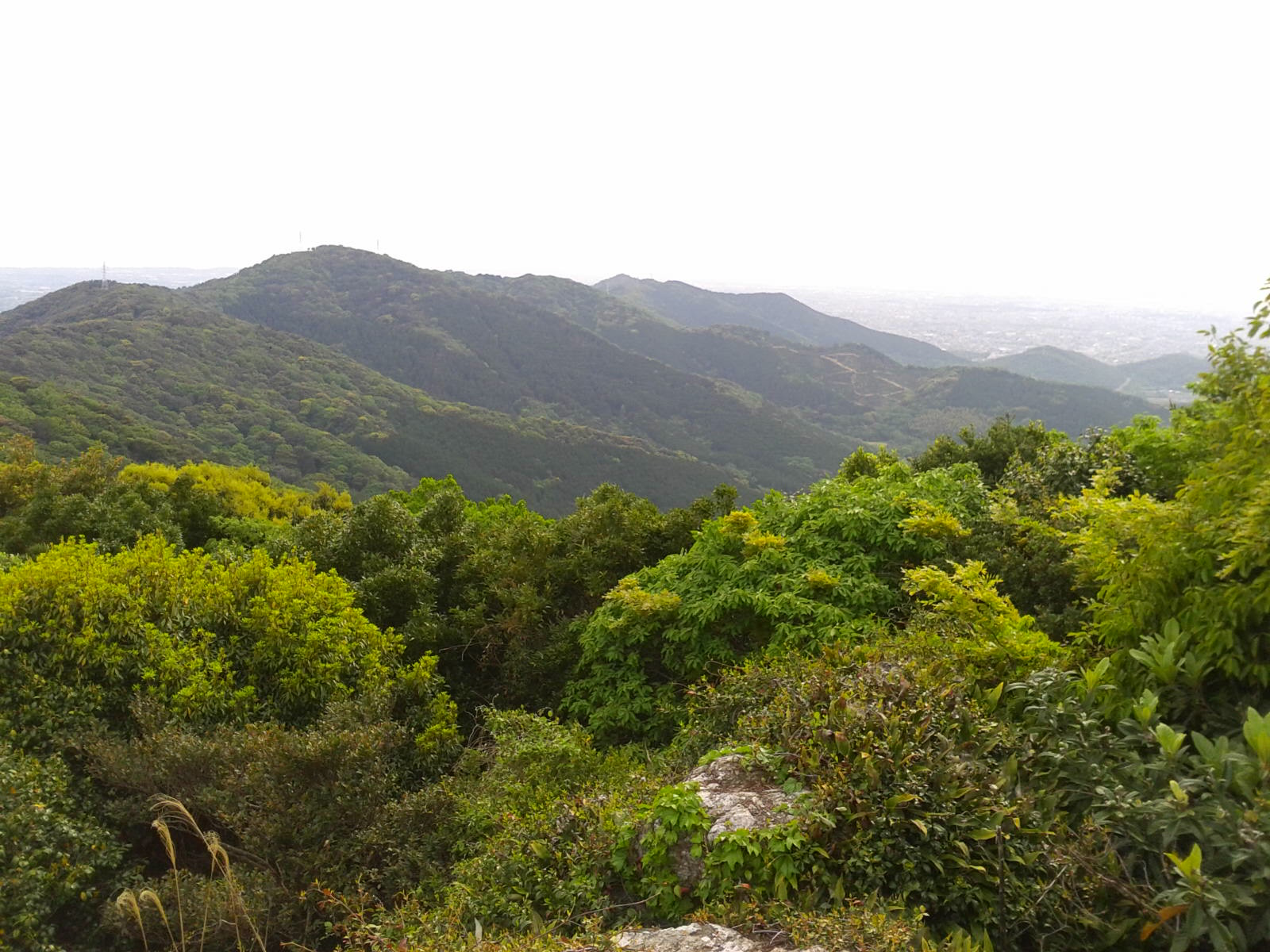 湖西連峰 景色（雨宿り岩から）